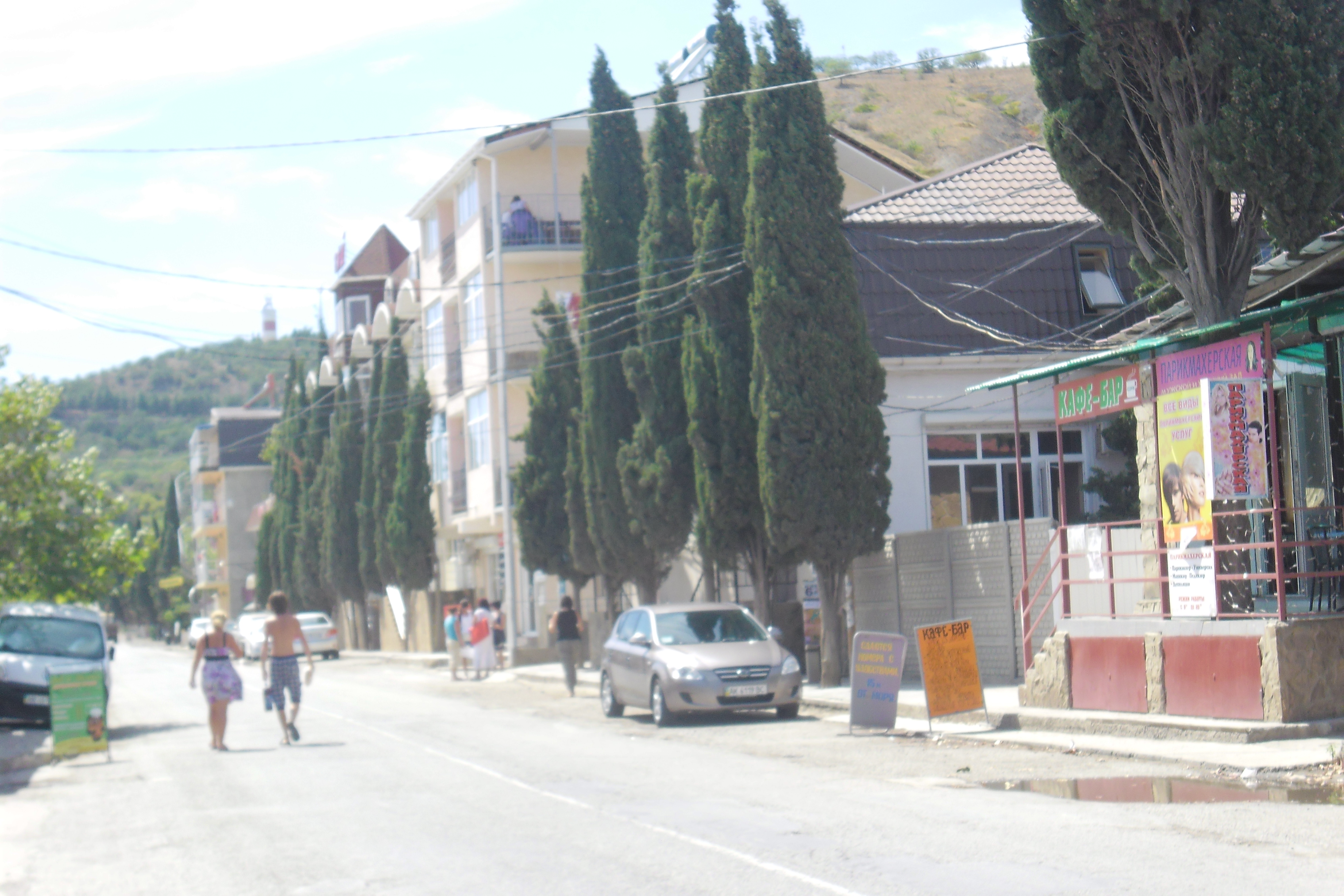 Рибаче